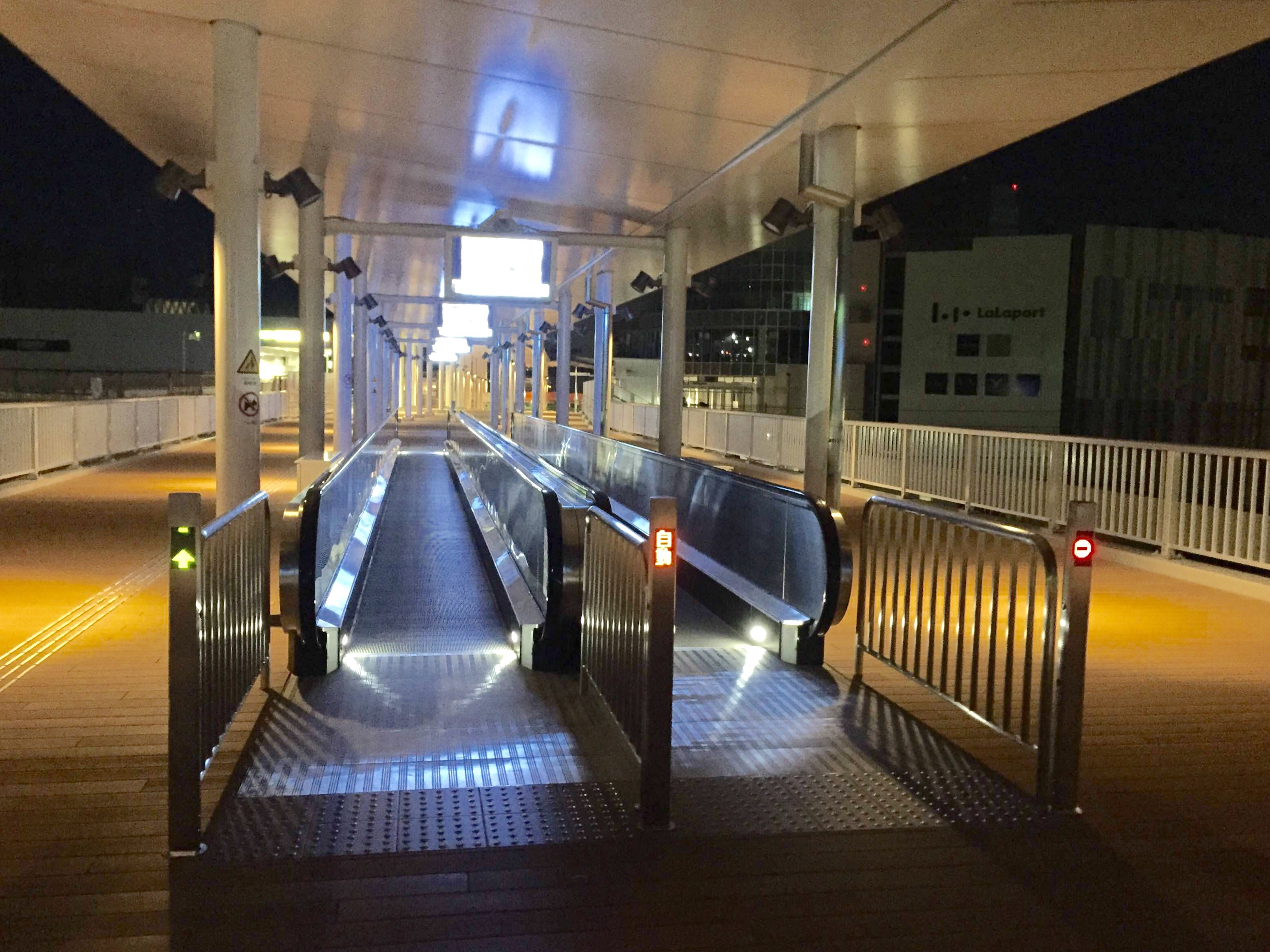 2015年10月に完成した小田急〜JRの駅舎間における新自由通路。